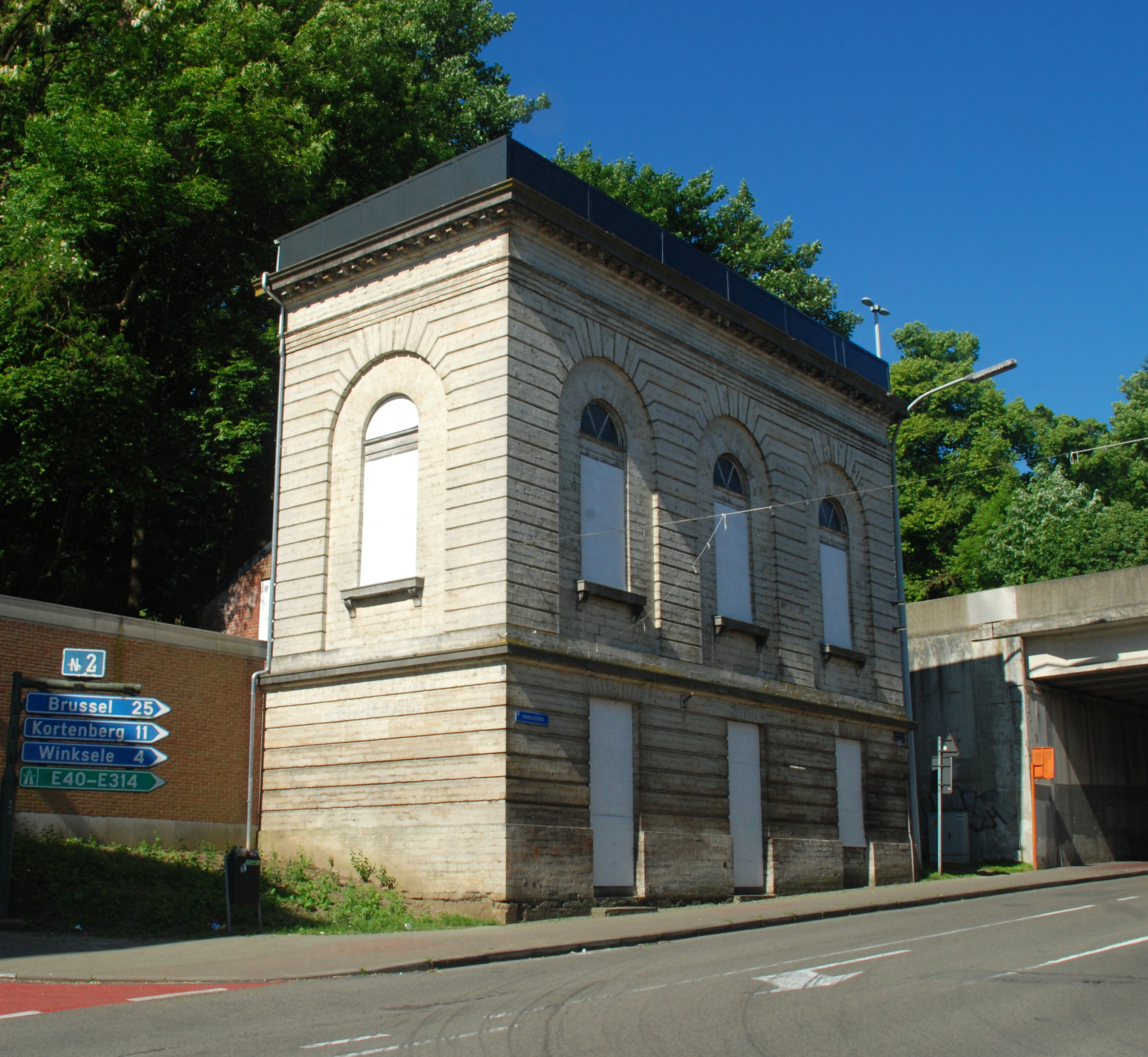 Belgique - Brabant flamand - Louvain - Porte de Bruxelles (néo-classique 1825, architecte Martin Hensmans)